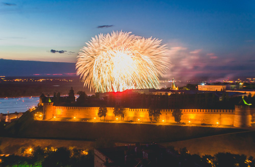 Салют в честь дня города и дня России над Нижегородским кремлём